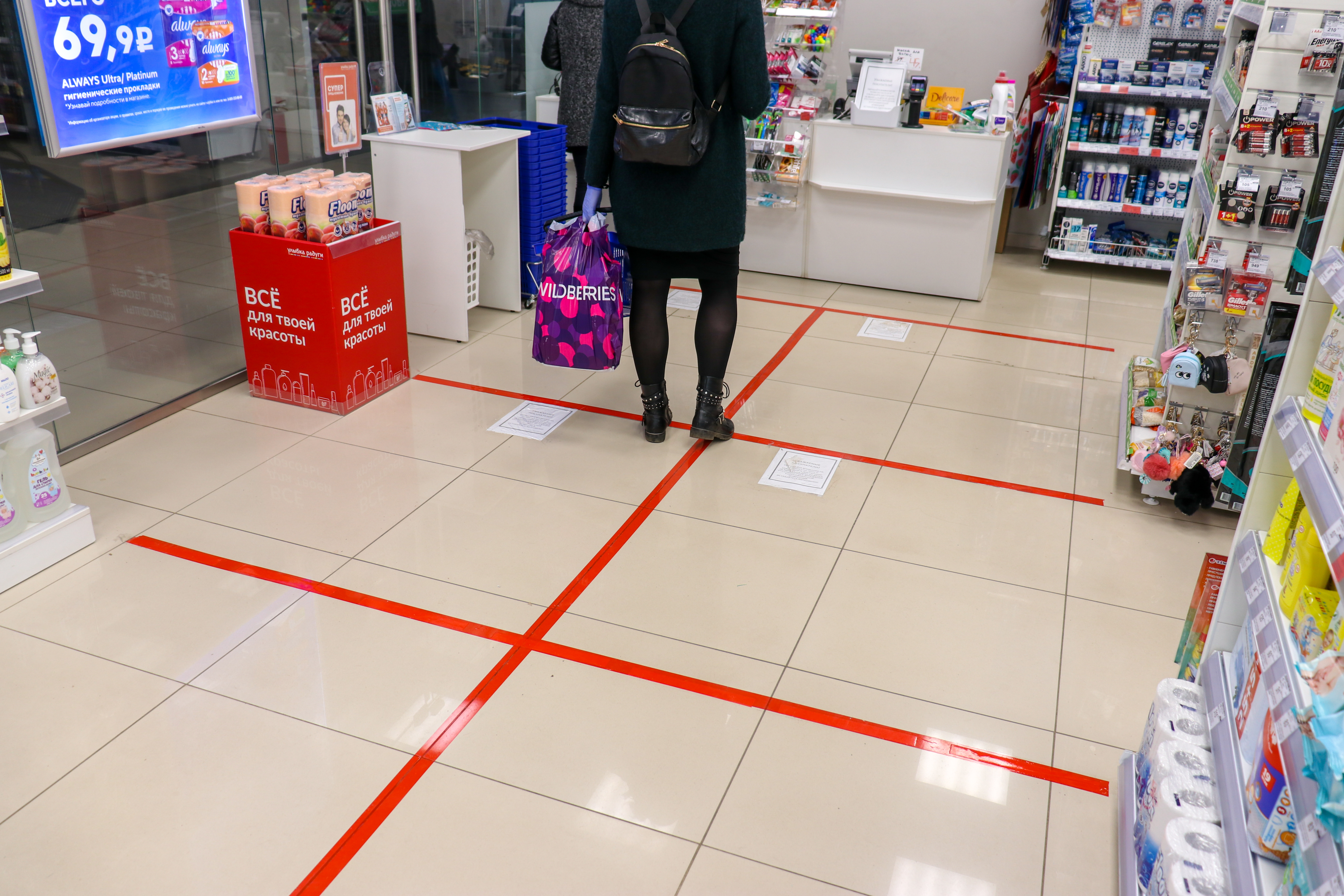 Разметка на полу (красные полосы) около касс в магазине в Москве в период пандемии COVID-19, указывающая дистанцию, которую должны соблюдать покупатели в очереди